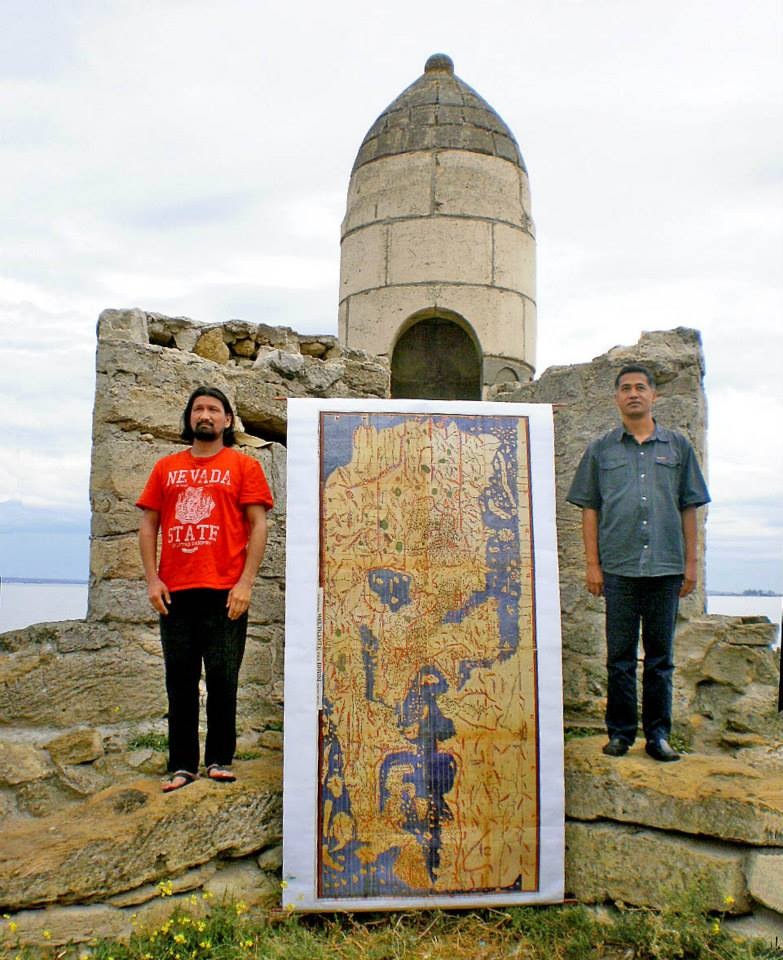 Инсталляция И.Шейх-Задэ "МадагасКрым" на руинах крепости Ени-Кале. Слева направо: Исмет Шейх-Задэ (Крым) и Тантели Хариманга Ратувухери (Мадагаскар). V Боспорский форум, 20.09.2013. Фото И.Сида.